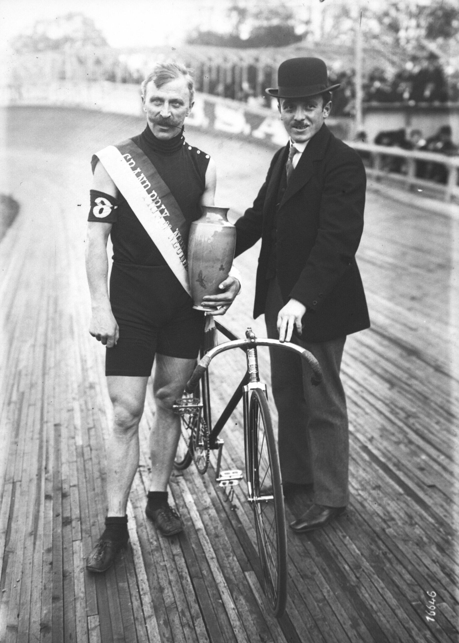 1911 Thorvald Ellegaard vainqueur au GP Neuilly